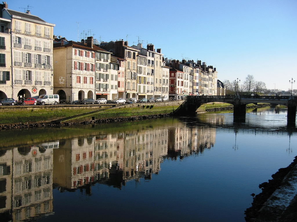 Bayonne (France), reflets dans la Nive. Photo prise le 03/01/05 par Harrieta171